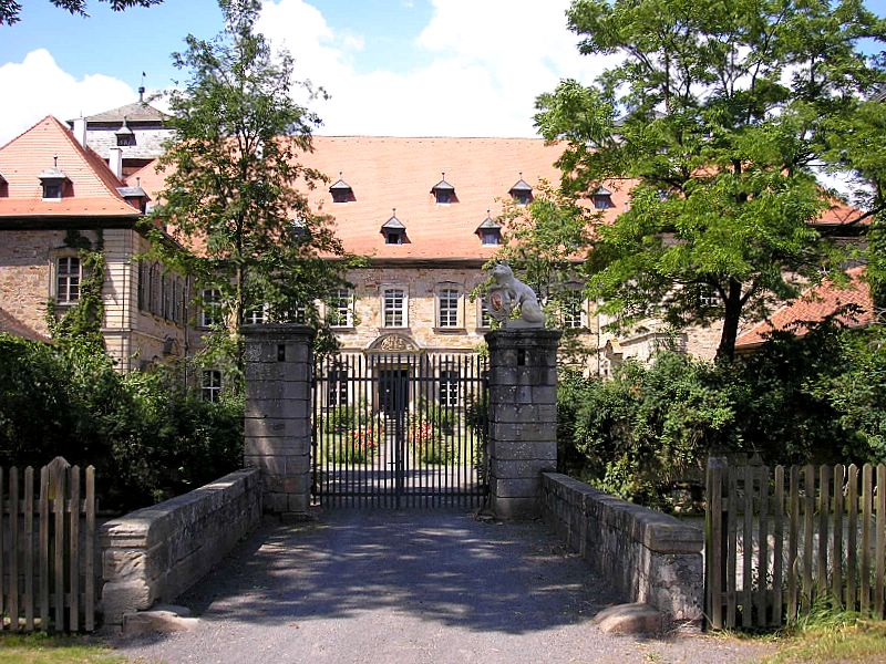 Schloss Burgpreppach (Landkreis Haßberge, Unterfranken) / Burgpreppach Castle, Franconia, Germany. Eingangsseite / Front view. Eigene Aufnahme, Juni 2006 / Own photo, June 2006)